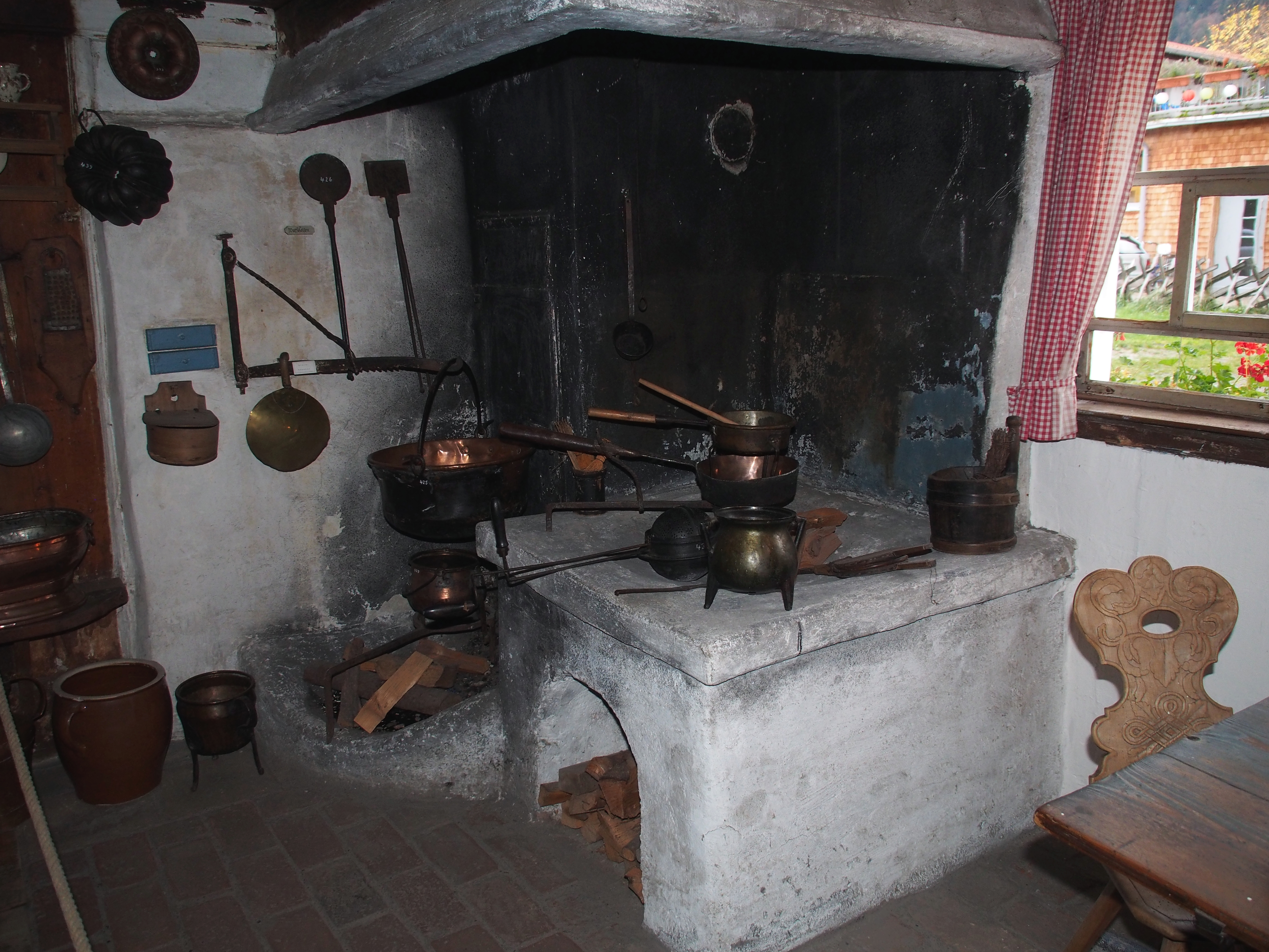 Feuerstelle im Heimatmuseum Oberstdorf